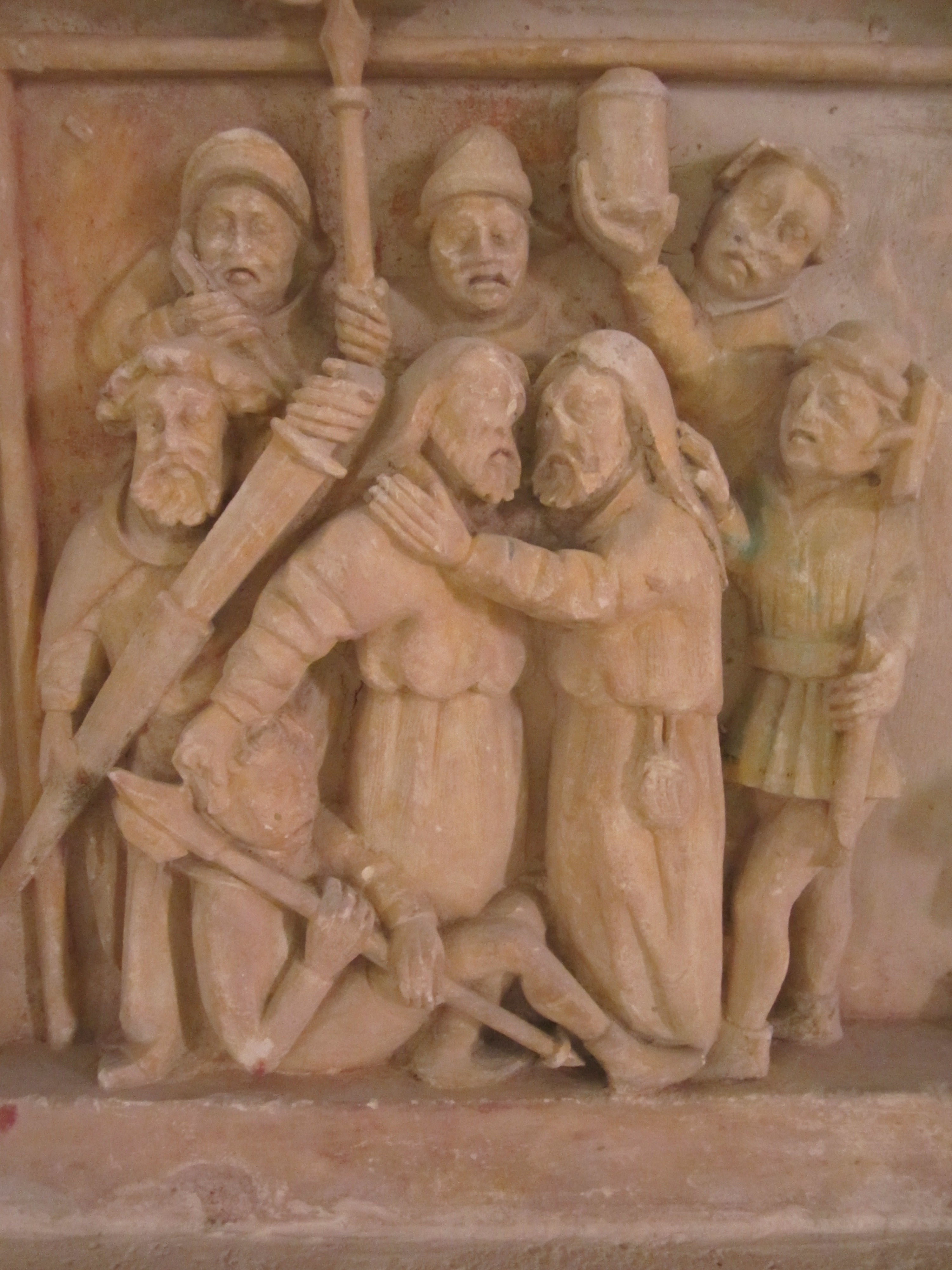 église Saint-Georges de Saint-Jores